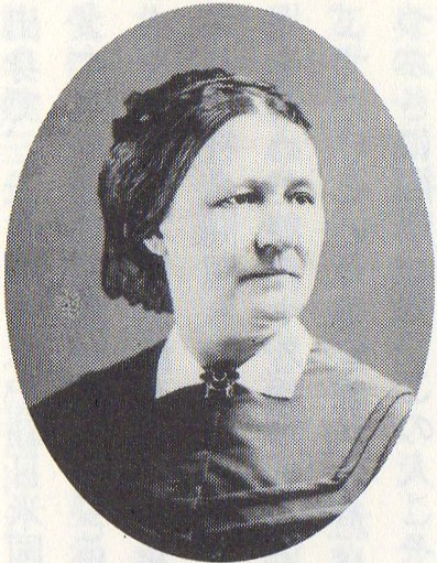 米国婦人一致外国伝道協会派遣宣教師プライン